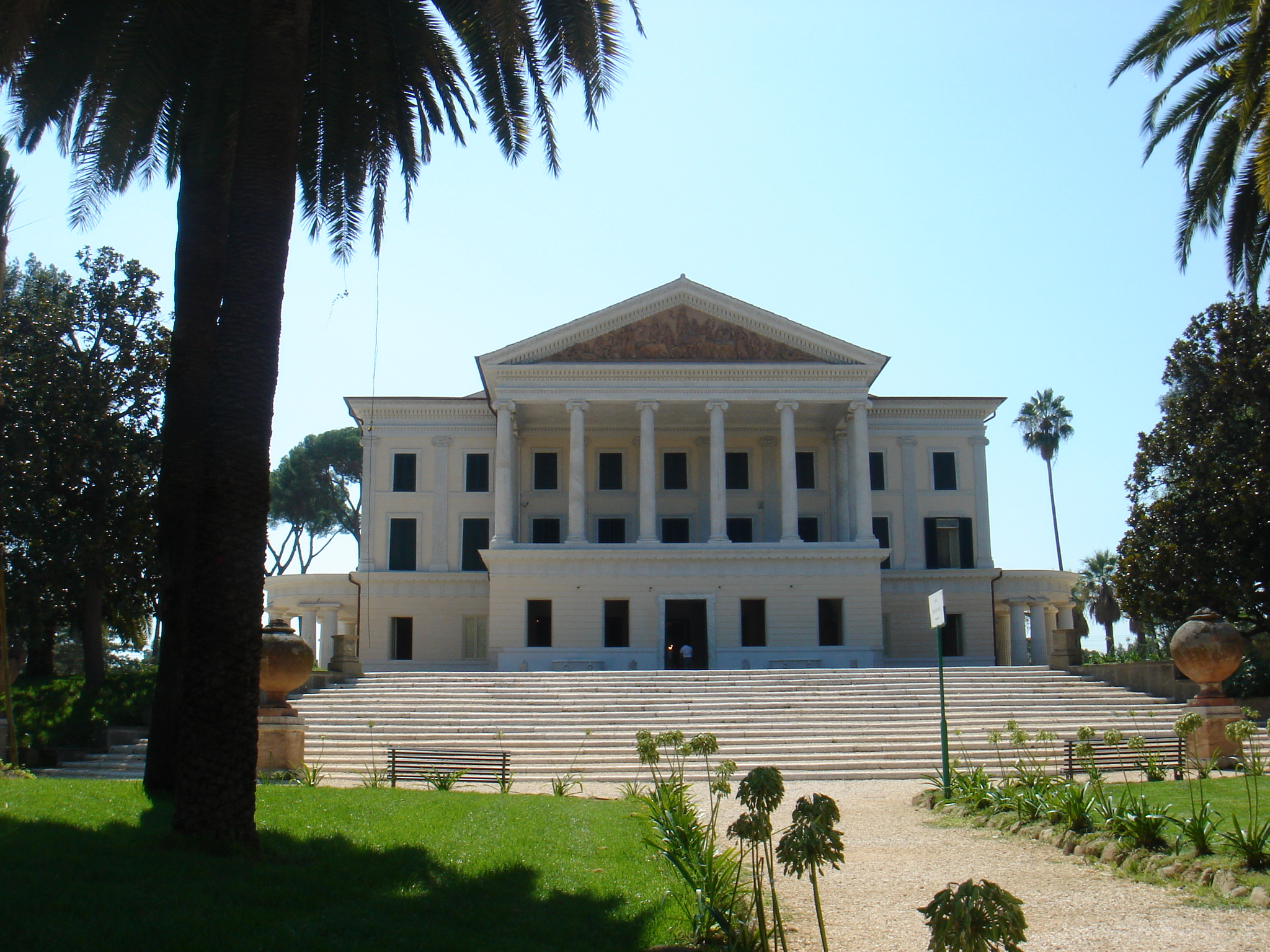 Roma, Villa Torlonia: facciata.